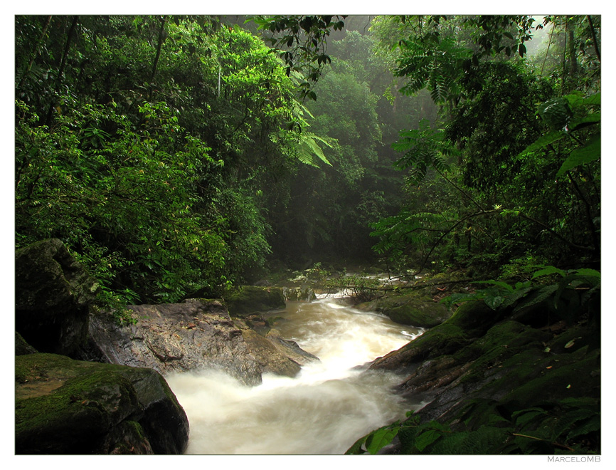 Rio Corujas - Vale do Ribeira